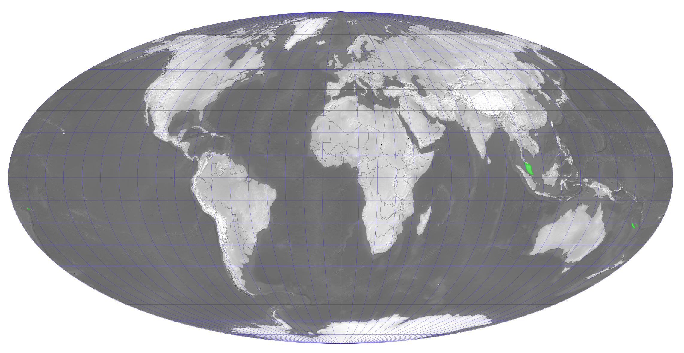 Distribution de Abrodictyum pluma - Carte établie avec QGIS par D. Prévôt - Fond image : Natural Earth ( relief en nuances de gris, reprojeté - Projection homolographique de Babinet